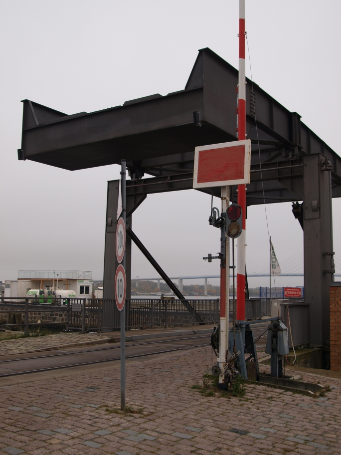 Deckungssignal an der Klappbrücke über den Querkanal im Stralsunder Hafengebiet. Das Nachtzeichen zeigt ein rotes Licht. Ist das Fahrverbot aufgehoben, wird die Scheibe weggeklappt bzw. in der Nacht das rote Licht verdeckt. Das Signal zeigt in Freilage kein Nachtzeichen, die grüne Blende ist durch ein Blech ersetzt.